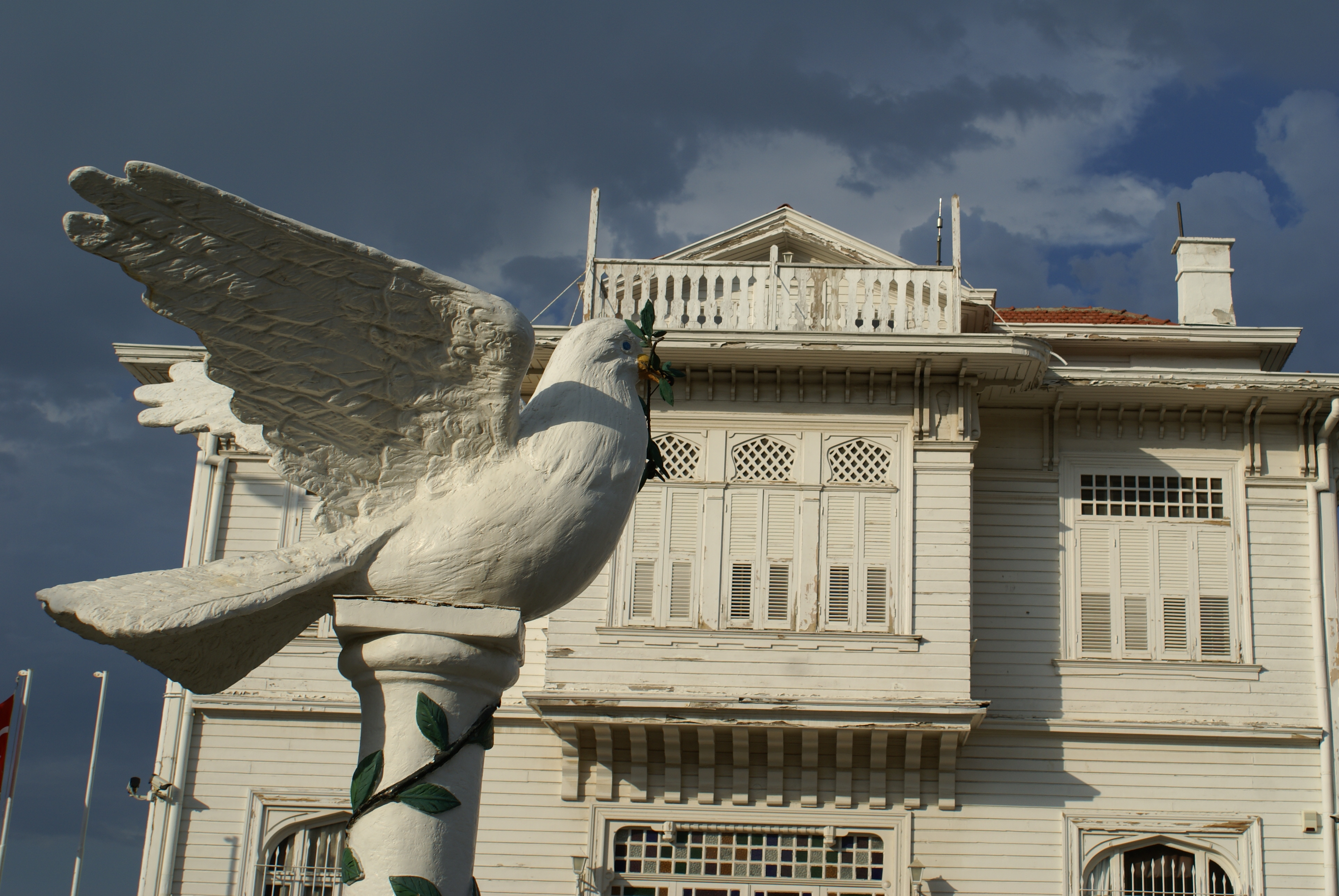 MUDANYA ATEŞKES ANLAŞMASI BURSA